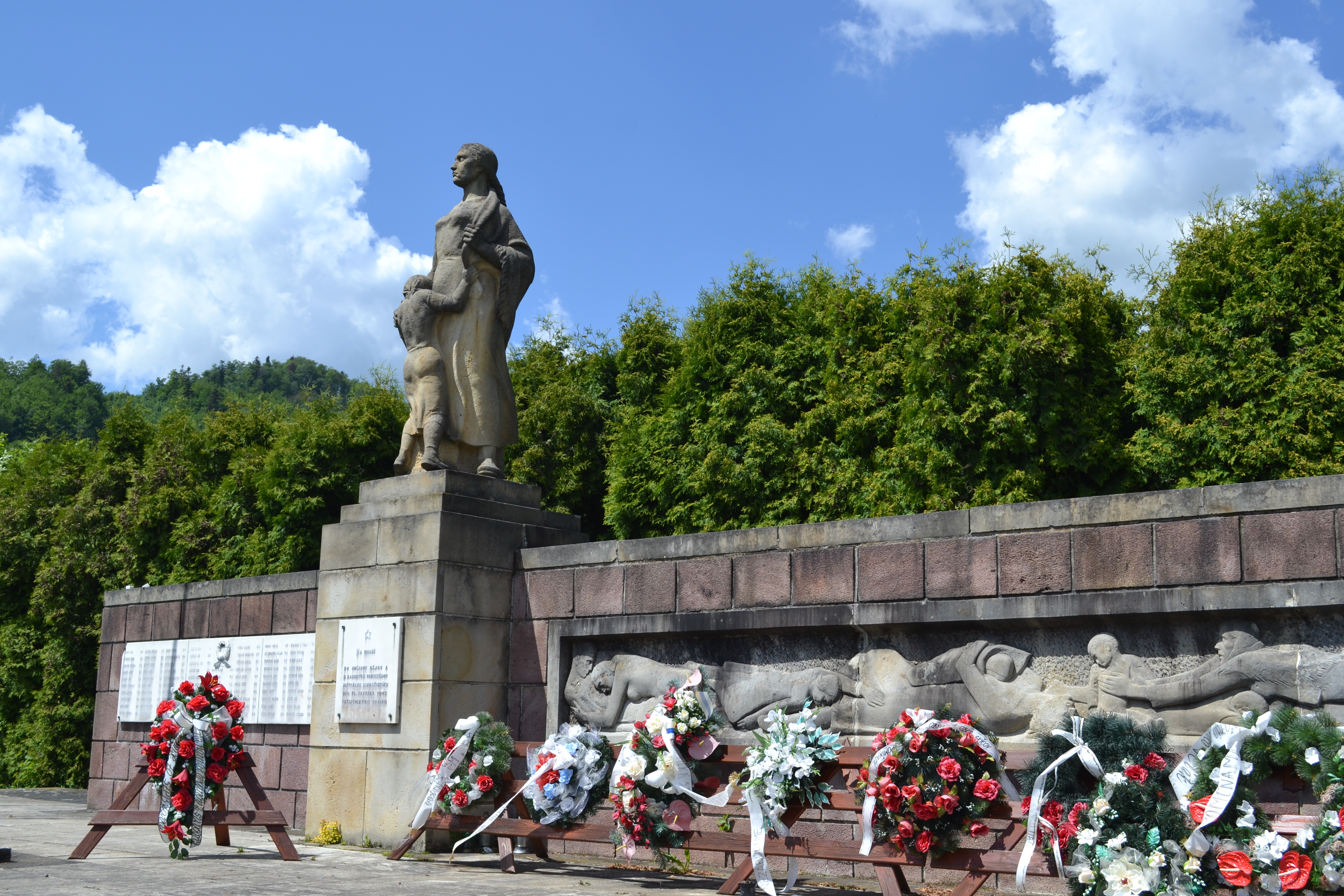 Pamätník v Kľaku venovaný obetiam nacistických represálií z 21. januára 1945